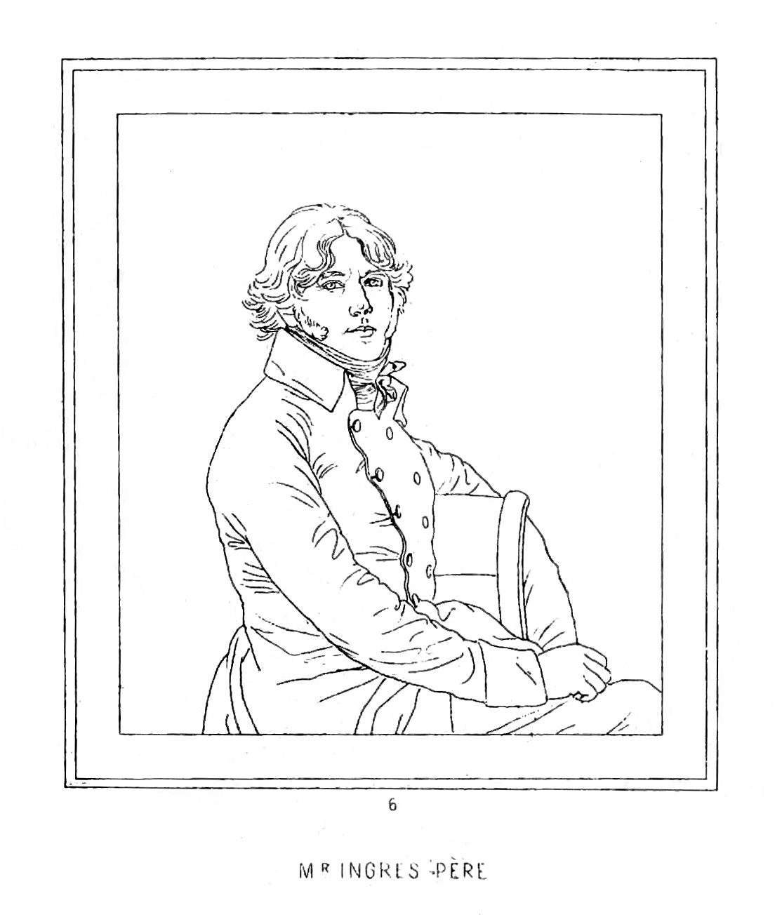 Achille Réveil, gravure au trait d'après Ingres portrait du père de l'artiste 1851 Oeuvres de J. A. Ingres : 1800-1851 gravé au trait